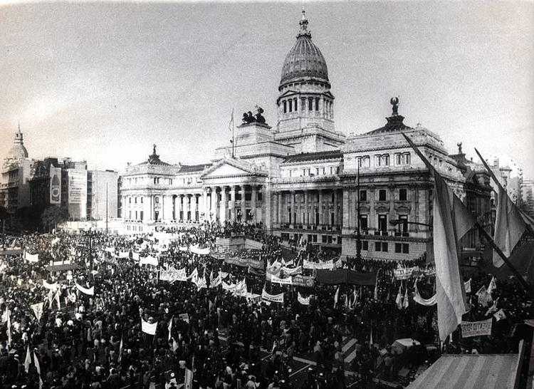 Vista general del Congreso de la Nación durante la asunción de Héctor Cámpora como Presidente de Argentina.